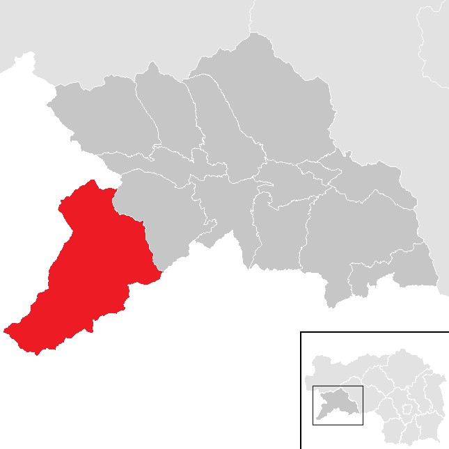 Lage von Stadl-Predlitz im Bezirk Murau